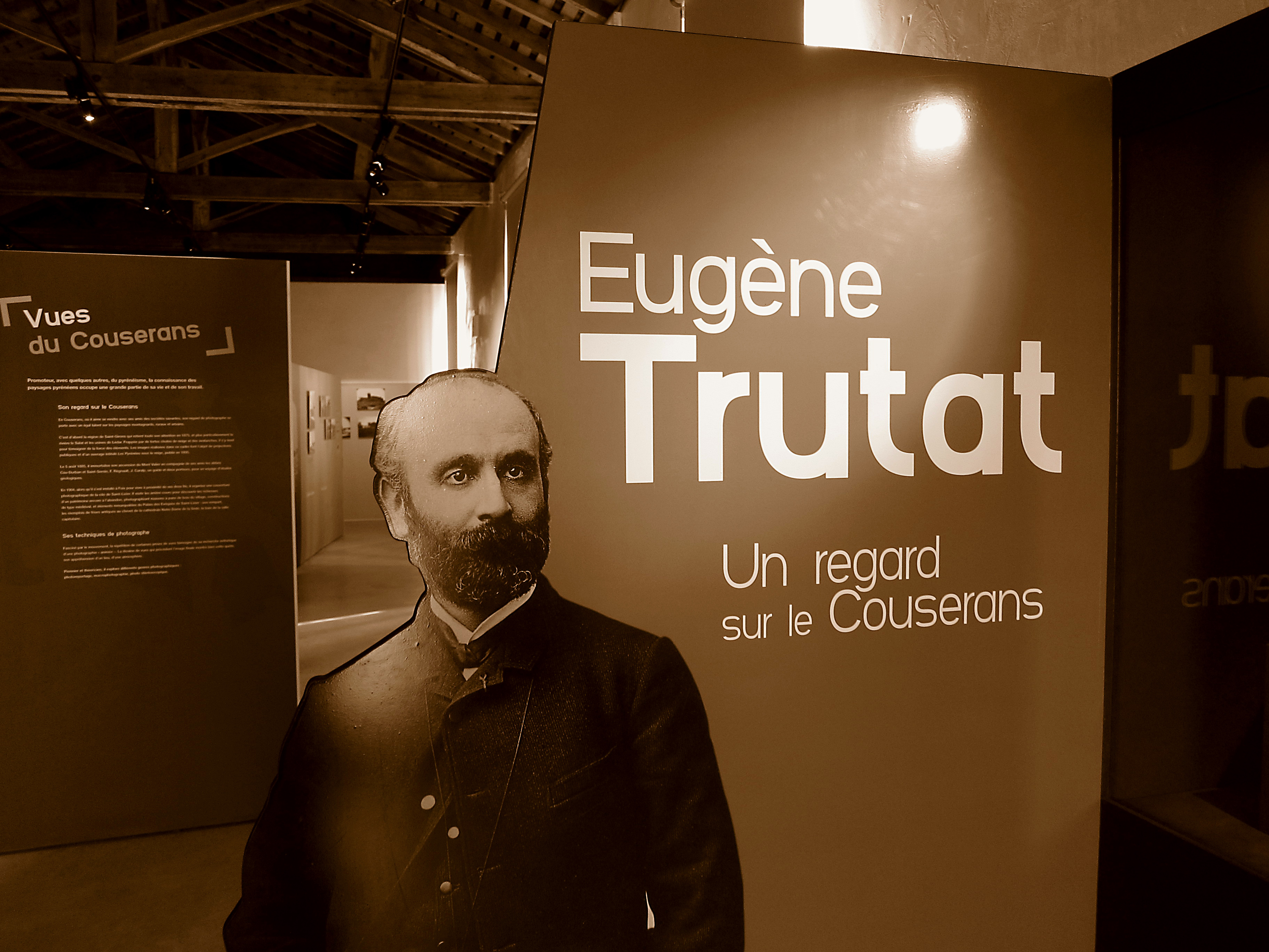 Saint-Lizier (Ariège, France) : Entrée de l'exposition "Eugène Trutat - Un regard sur le Couserans" au Palais des Évêques.